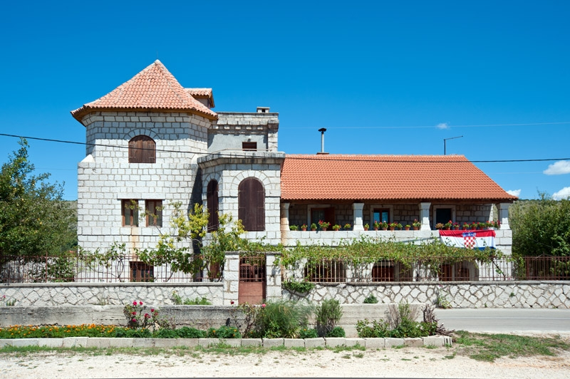 Ivan Meštrović